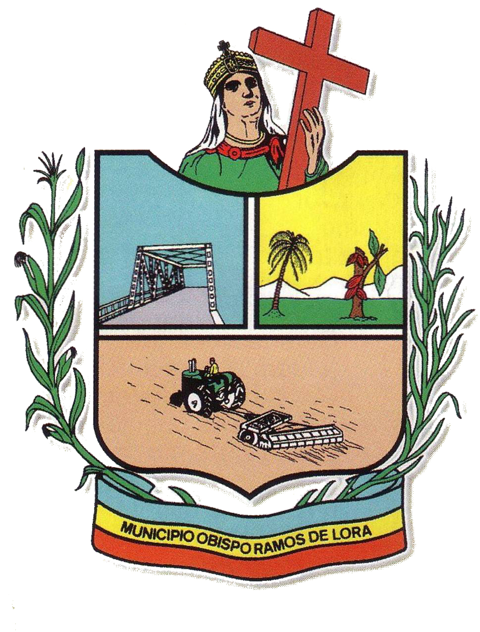 Escudo del Municipio Obispo Ramos de Lora del Estado Merida